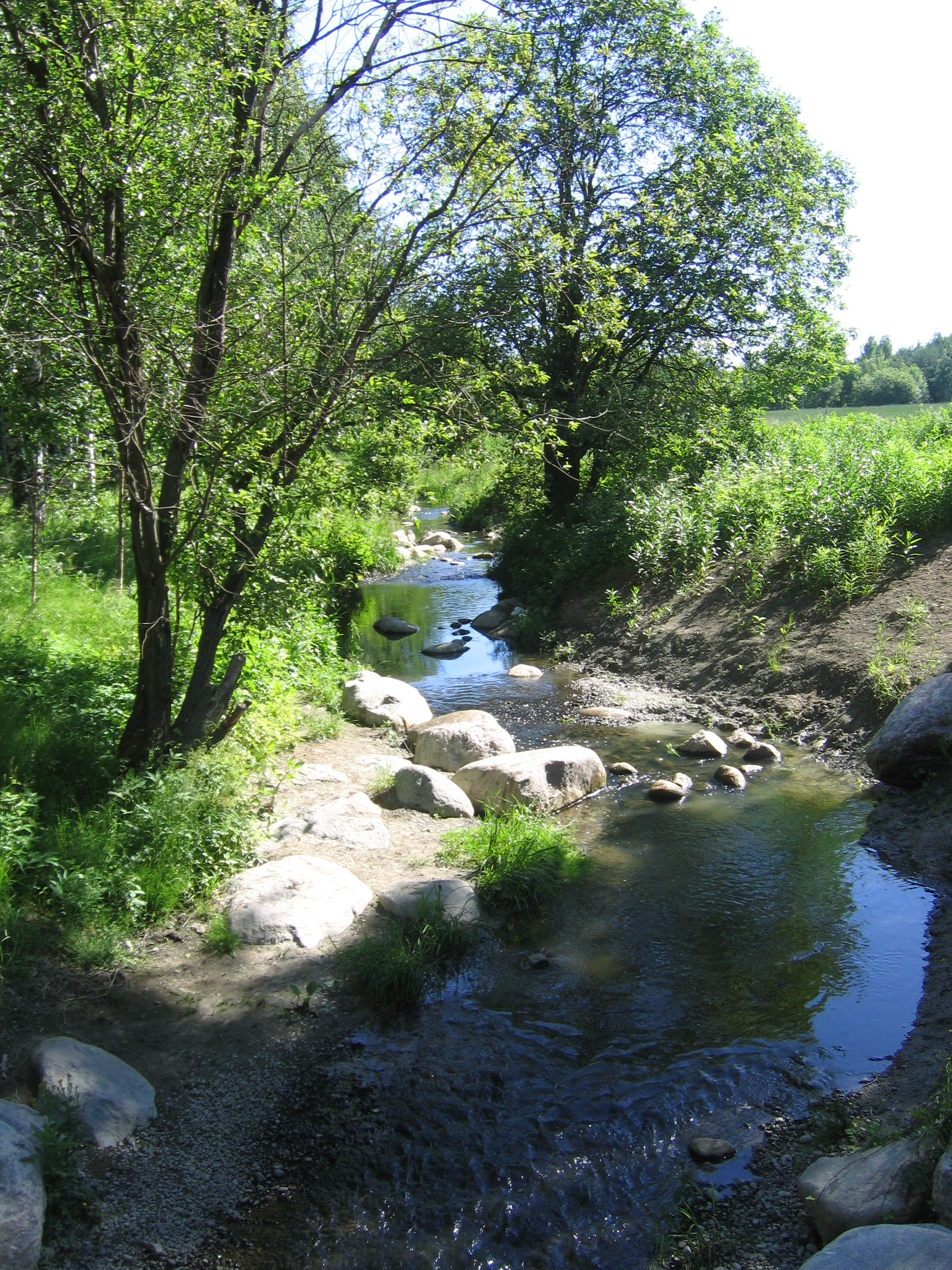 Kunnostettu Longinoja